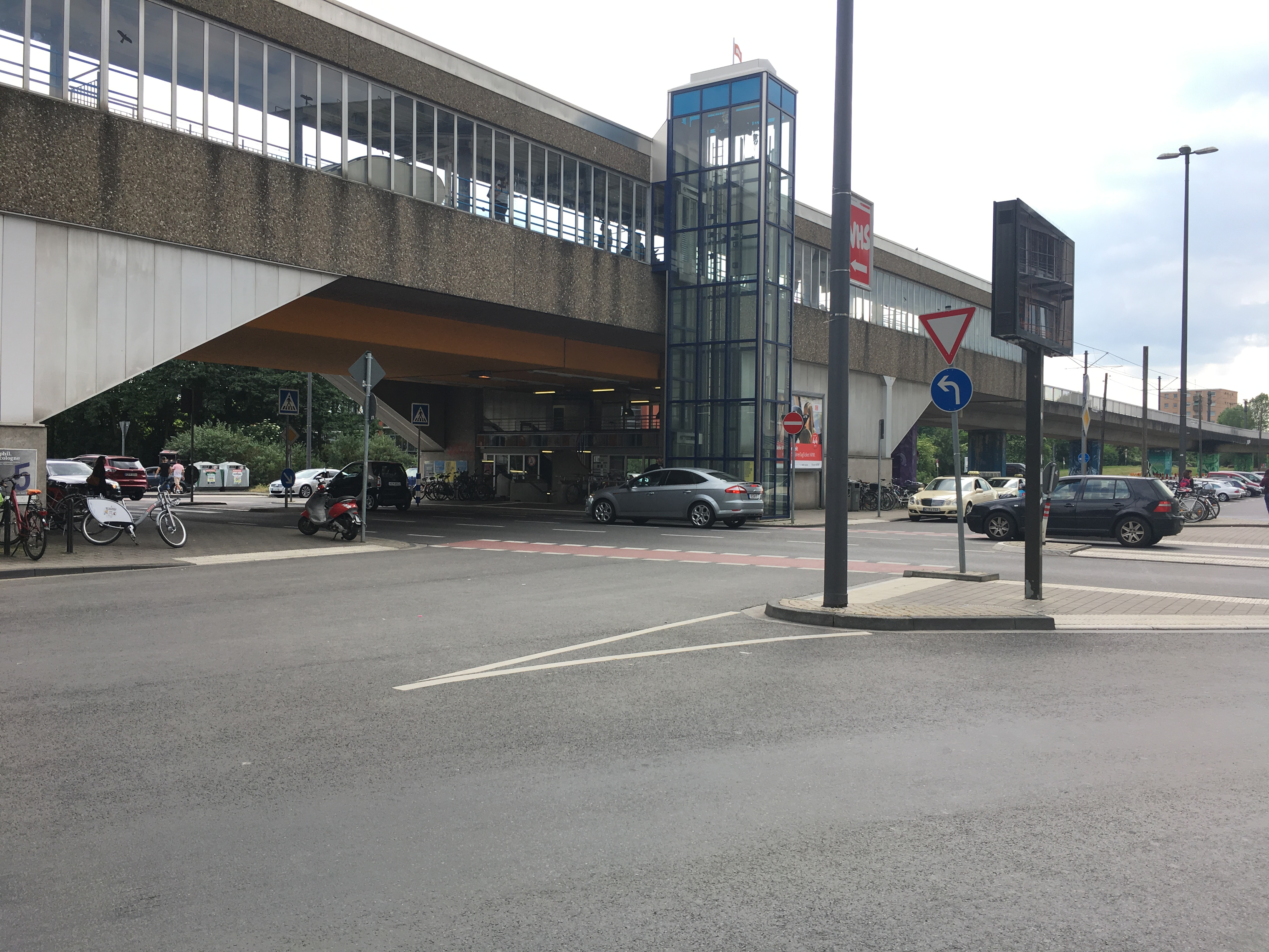 Vorschau der Haltestellenlage